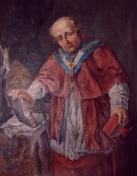 Retrato del cardenal Pedro de Quevedo y Quintano (1776-1818)